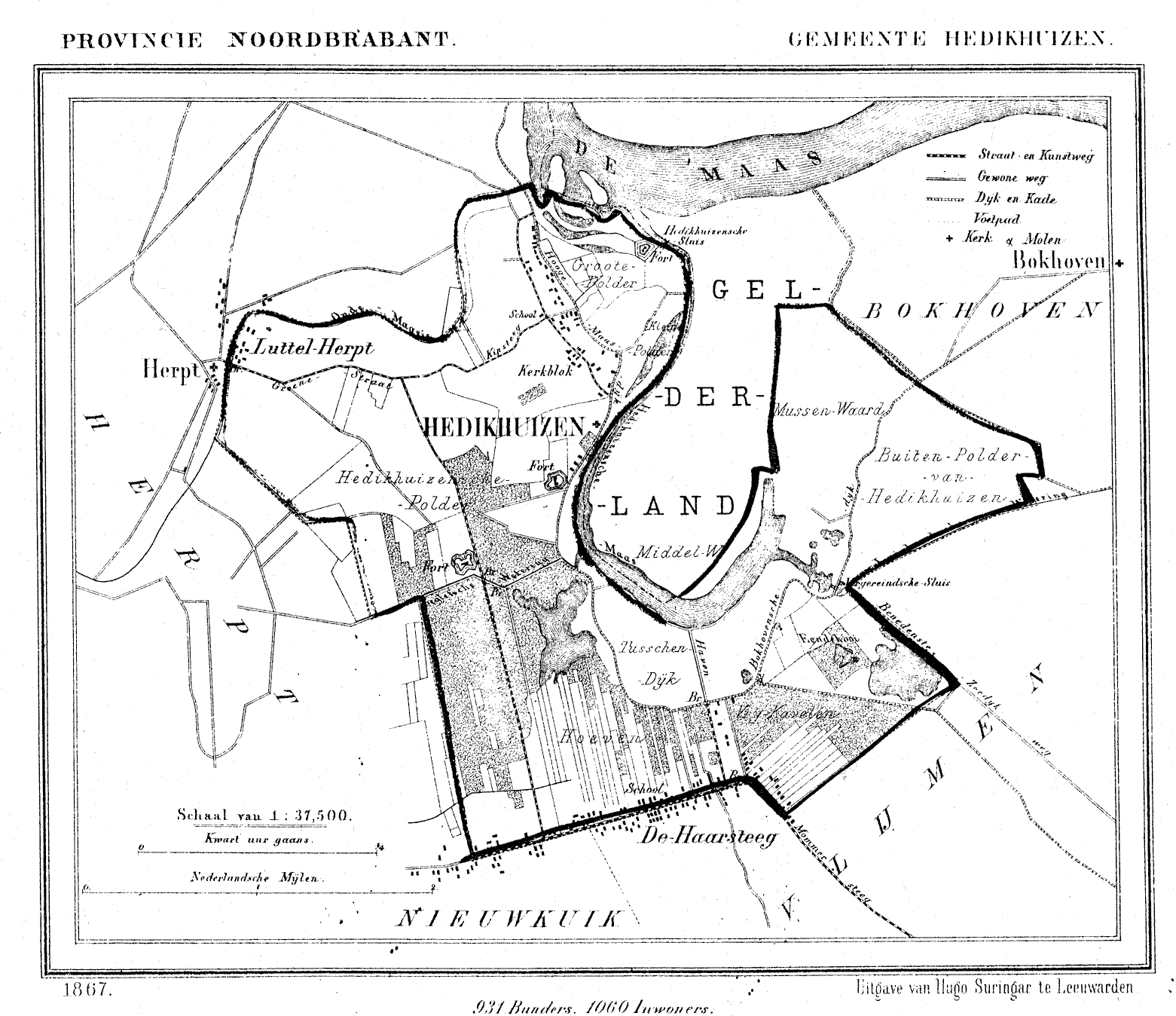 Nederland, Noord-Brabant, Gemeente Hedikhuizen